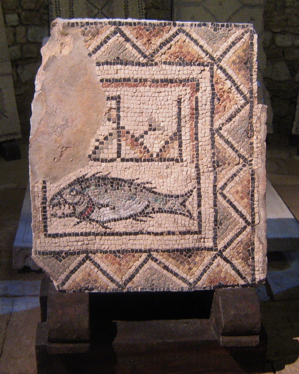 Mozaik u Eufrazijevoj bazilici